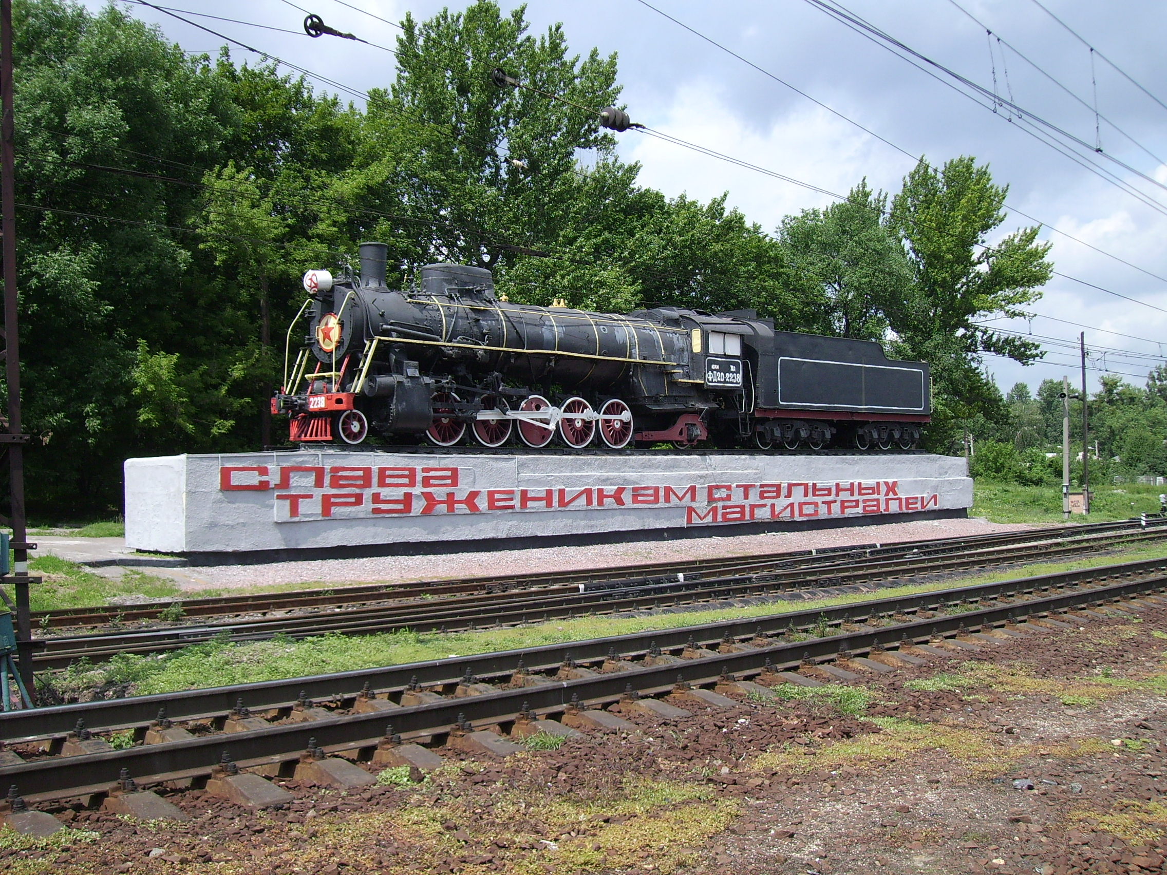 Transport in Kharkov. Steam locomotive FD-20. Паровоз-памятник Южной железной дороги ФД20-2238 у подножия Карпова сада напротив ж.д. платформы Новосёловка, Харьков.